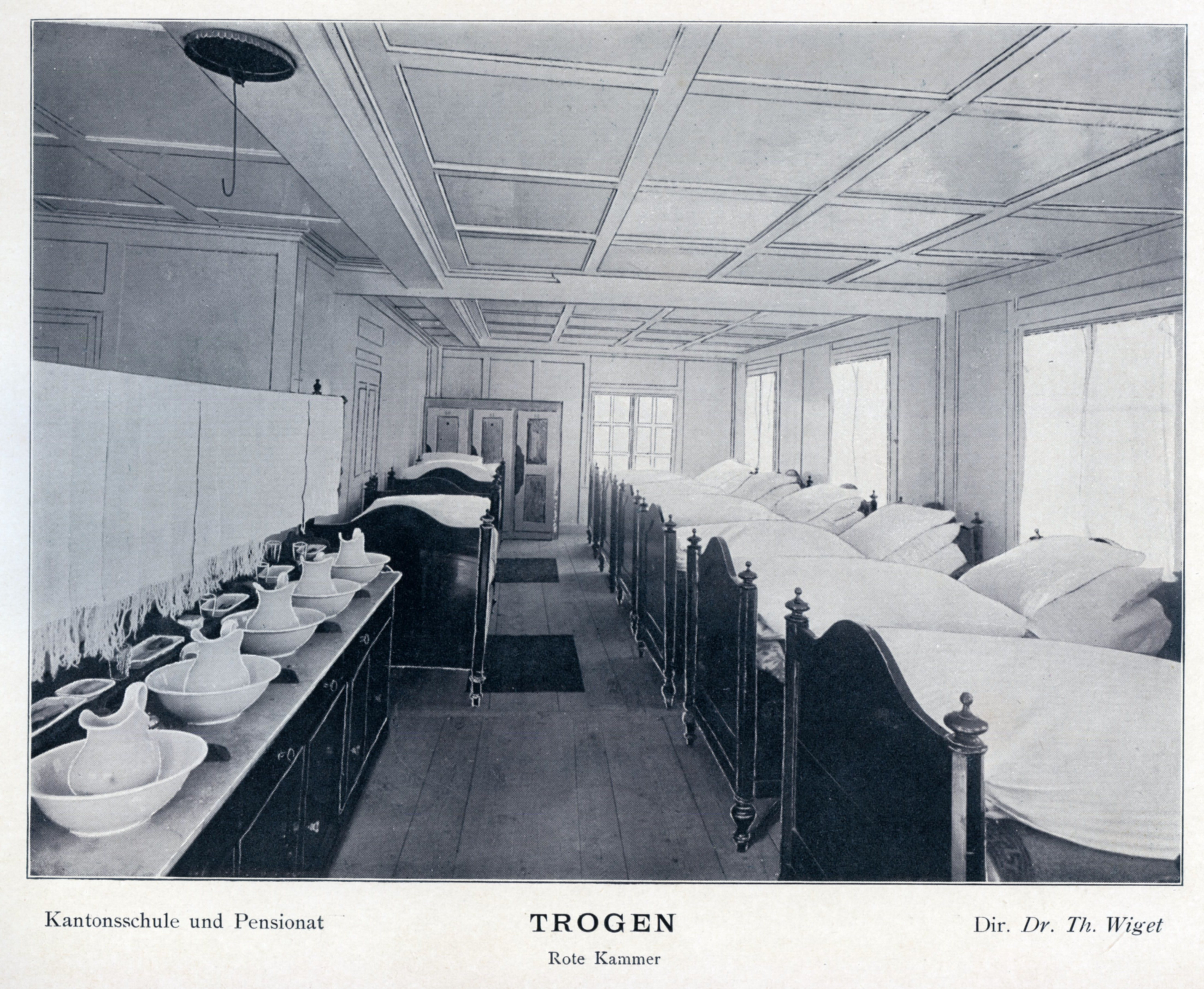 Schlafsaal, Altes Knabenkonvikt, Kantonsschule Trogen